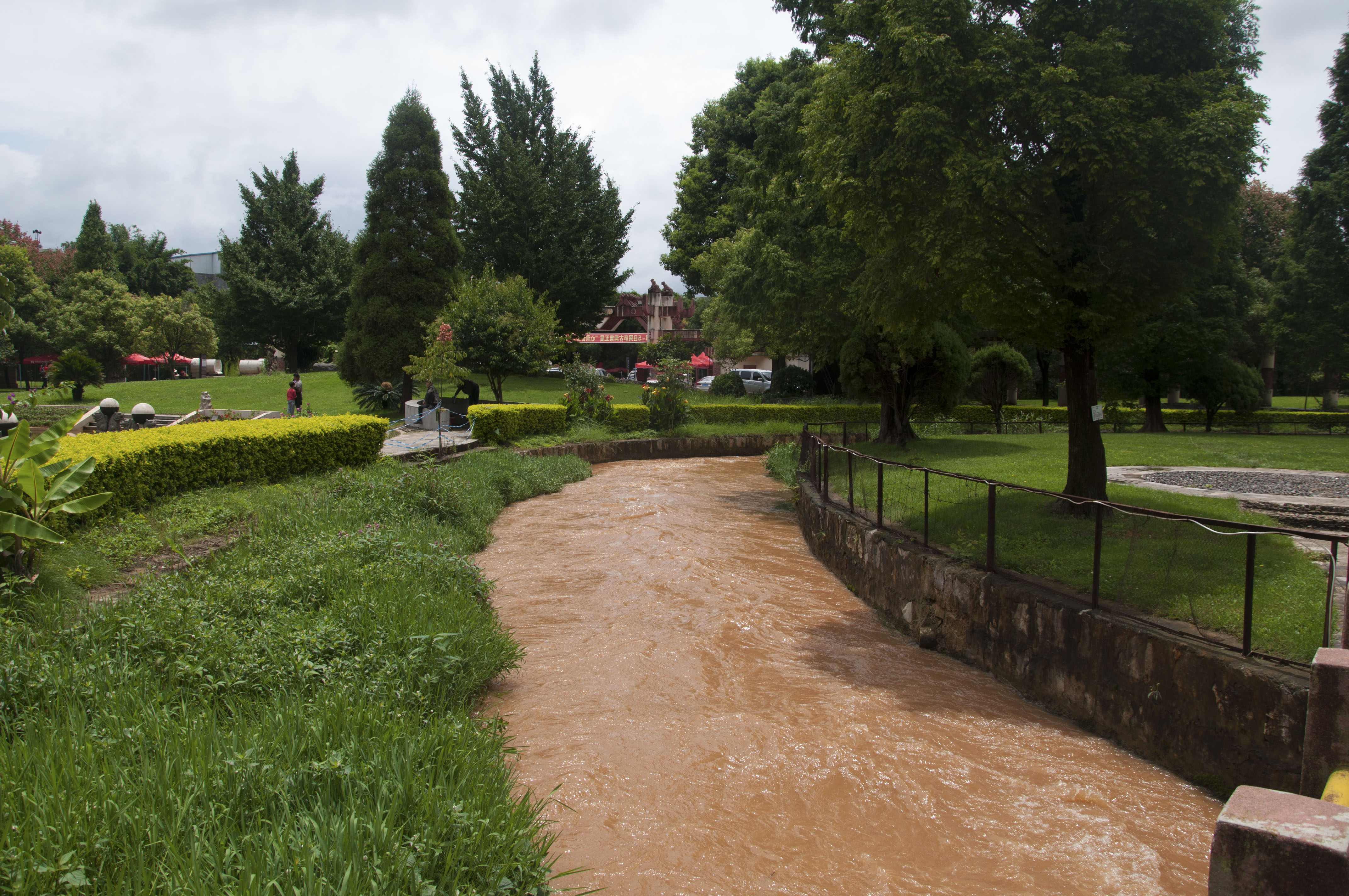 云南省泸西县阿庐古洞景区门口的小江（西大河）河道。